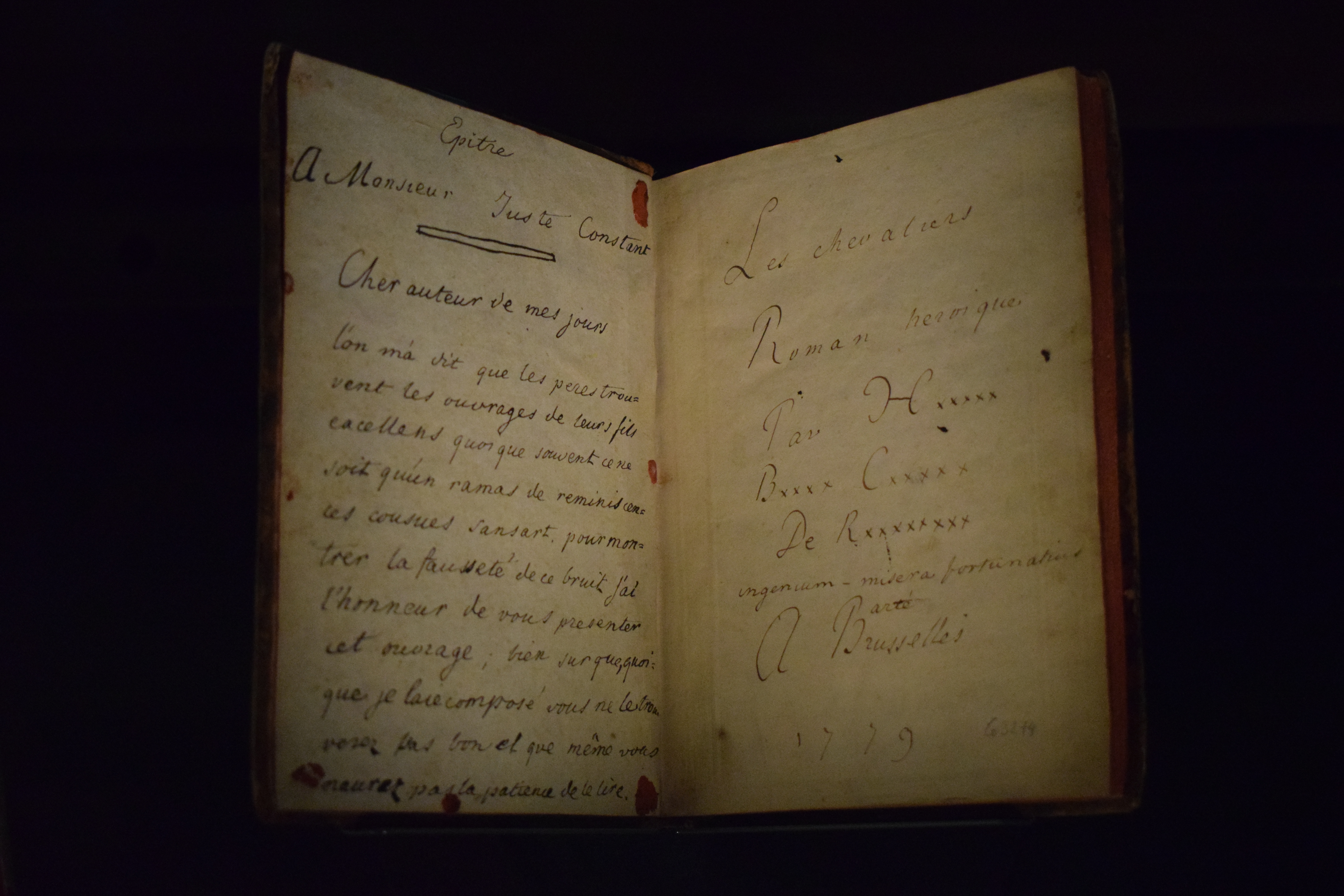 « Les Chevaliers », roman héroïque en cinq chants, composé par l'écrivain et homme politique français Benjamin Constant à l'âge de 12 ans et paru à Bruxelles, ici exposé à la Fondation Martin Bodmer à Cologny (faubourg de Genève) en Suisse dans le cadre d'une exposition temporaire consacrée à Germaine de Staël et Benjamin Constant, à l'occasion du bicentenaire de la mort de l'une (Paris, 14 juillet 1817) et des 250 ans de la naissance de l'autre (Lausanne, 25 octobre 1767). Manuscrit autographe. Bibliothèque cantonale et universitaire de Lausanne, Fonds Constant.